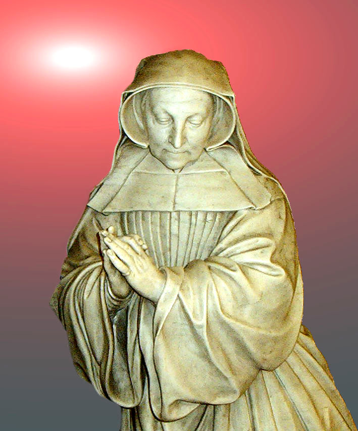 Description Beeld gemaakt door Artus Quellinus II uit het mausoleum van Anna Catharina de lamboy, abdis van Herkenrode. In het publiek domein geplaatst door de auteur. Beeld gemaakt door Artus Quellinus II uit het mausoleum van Anna Catharina de lamboy, abdis van Herkenrode.